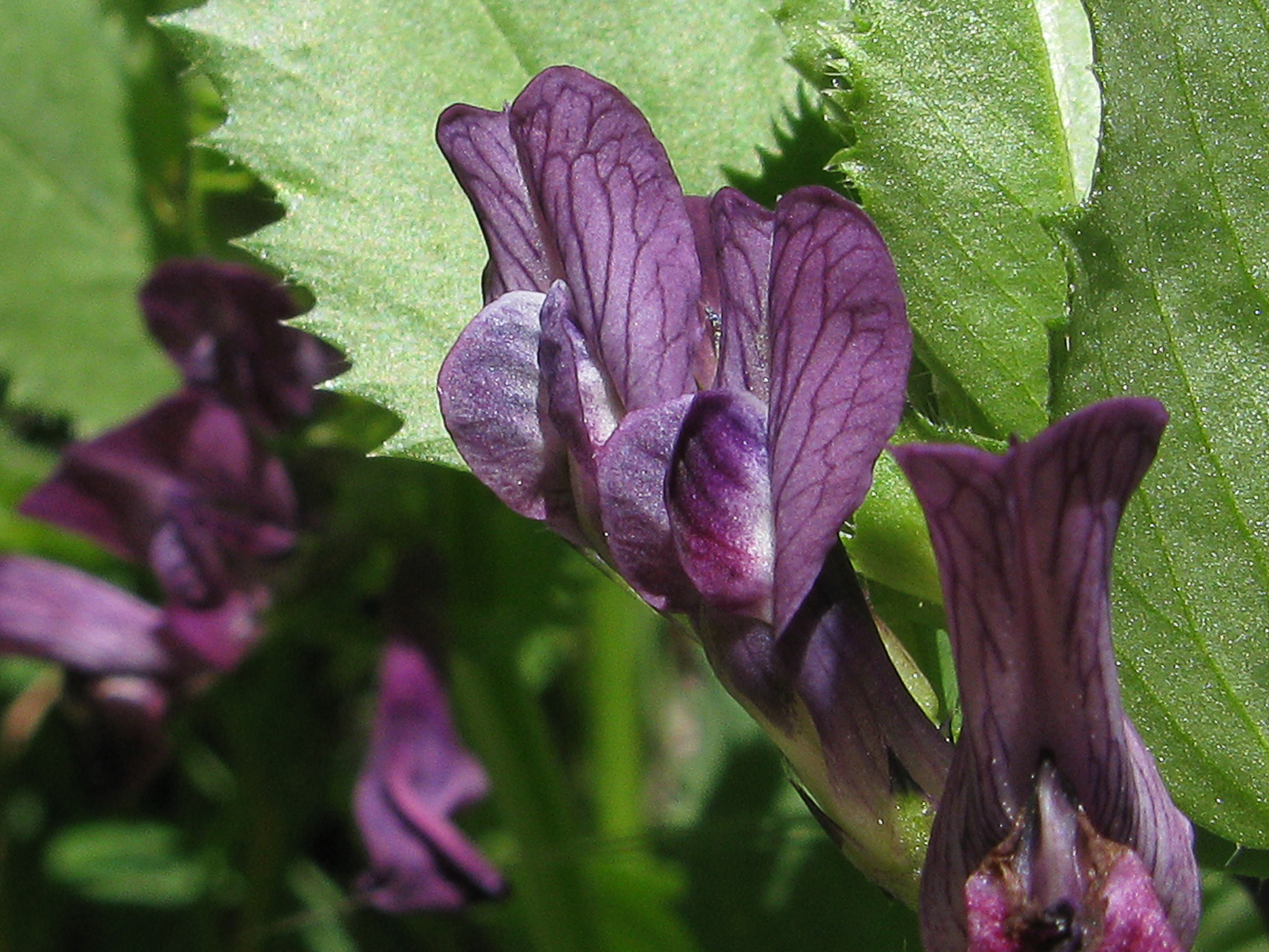 Esta especie, perteneciente a la tribu Viciae (la misma que engloba a habas, guisantes, vezas, etc.), de nombre científico Vicia narbonensis L. (aunque descrita también como Bona narbonensis Medik, Faba narbonensis (L.) Schur, Vicia platycarpos Roth) y nombres comunes como alberjón, haba loca, etc., es originaria de la cuenca mediterránea Actualmente en España su importancia es escasa, cultivándose sólo en algunas zonas de Castilla-La Mancha, Extremadura y Andalucía Casi sin lugar a dudas alguien le podrá encontrar un uso decorativo a esta especie